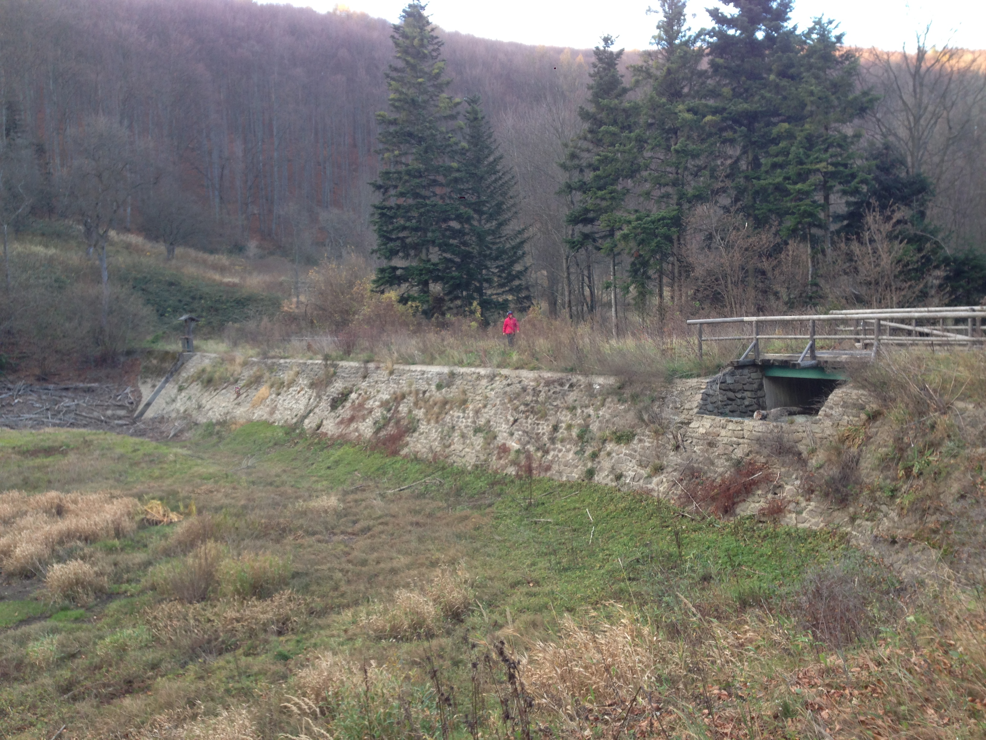 Riesenbachklause von Süden